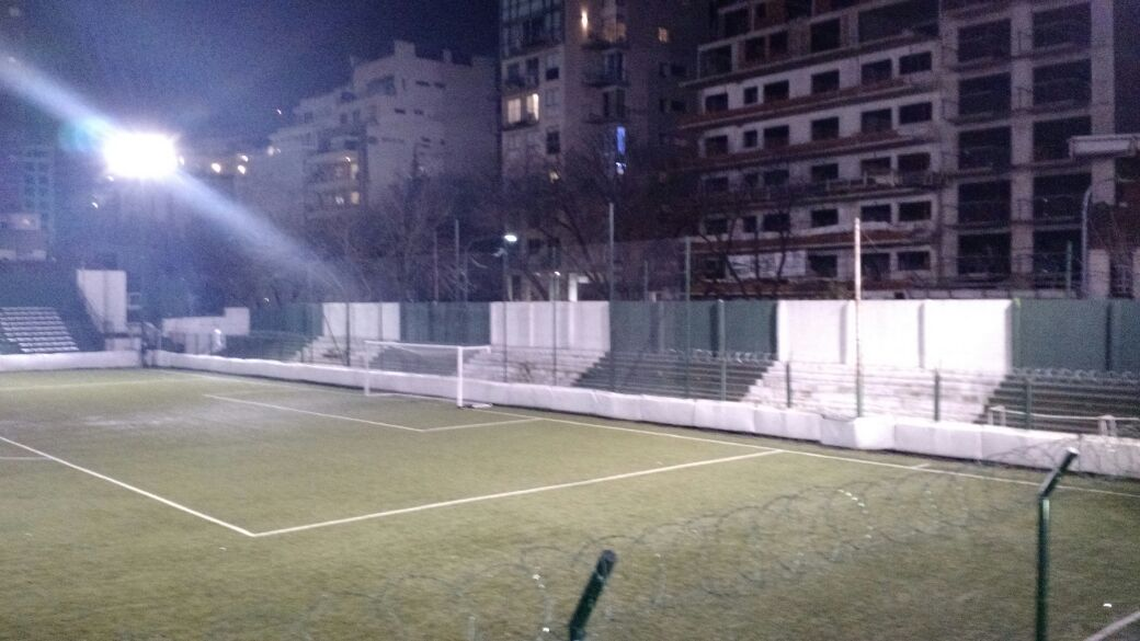 estadio de excursionistas de noche